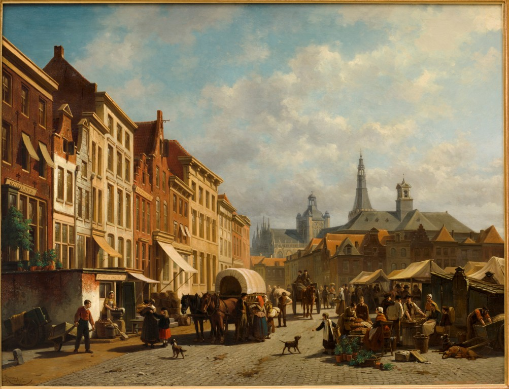 's-Hertogenbosch, gezicht op de Markt